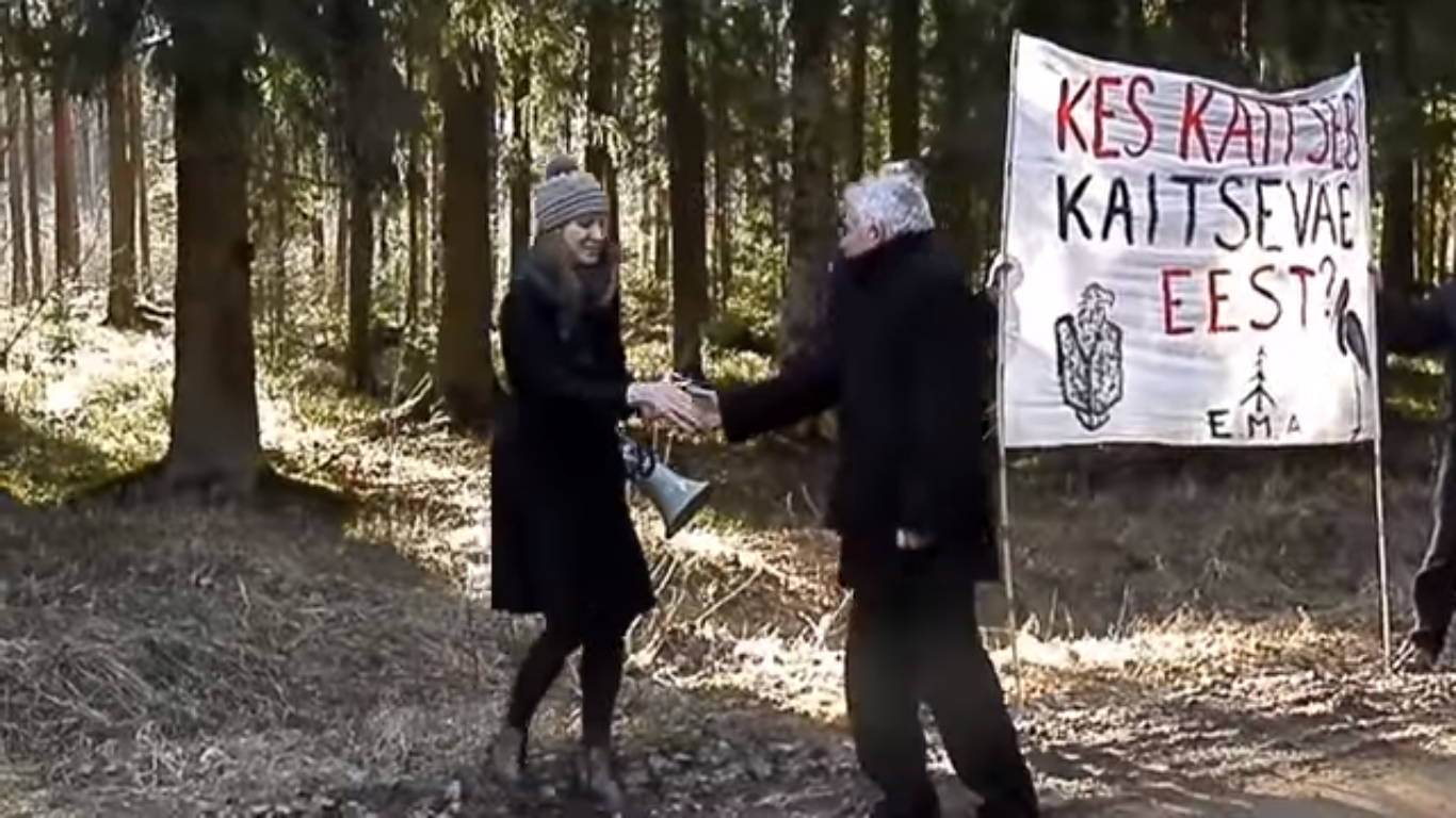 Eesti Metsa Abiks aktivistid Nursipalu harjutusväljaku väravas, koordinaator Väli annab teadmata taustaga härrasmehele kätt